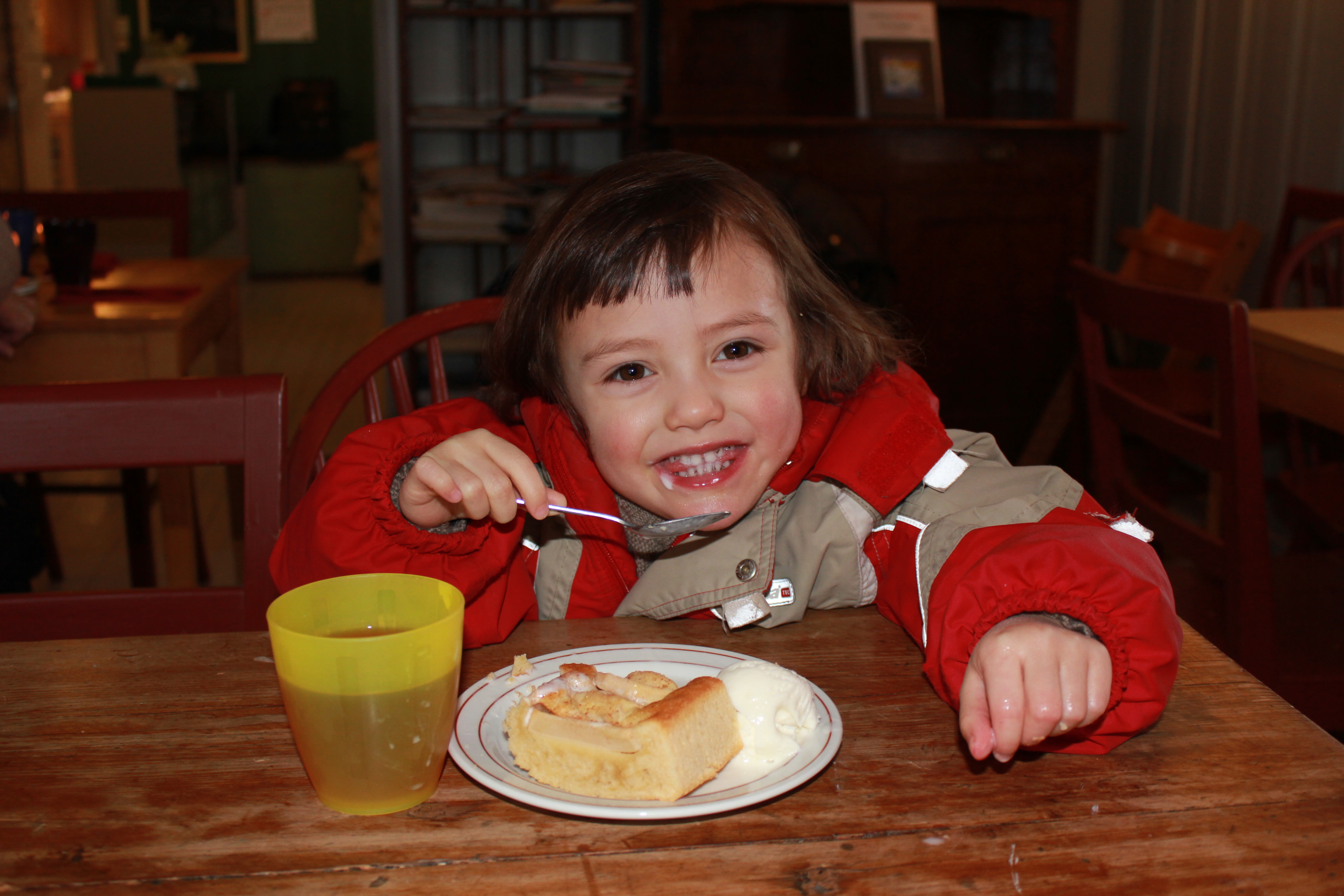 Jente spiser eplekake.